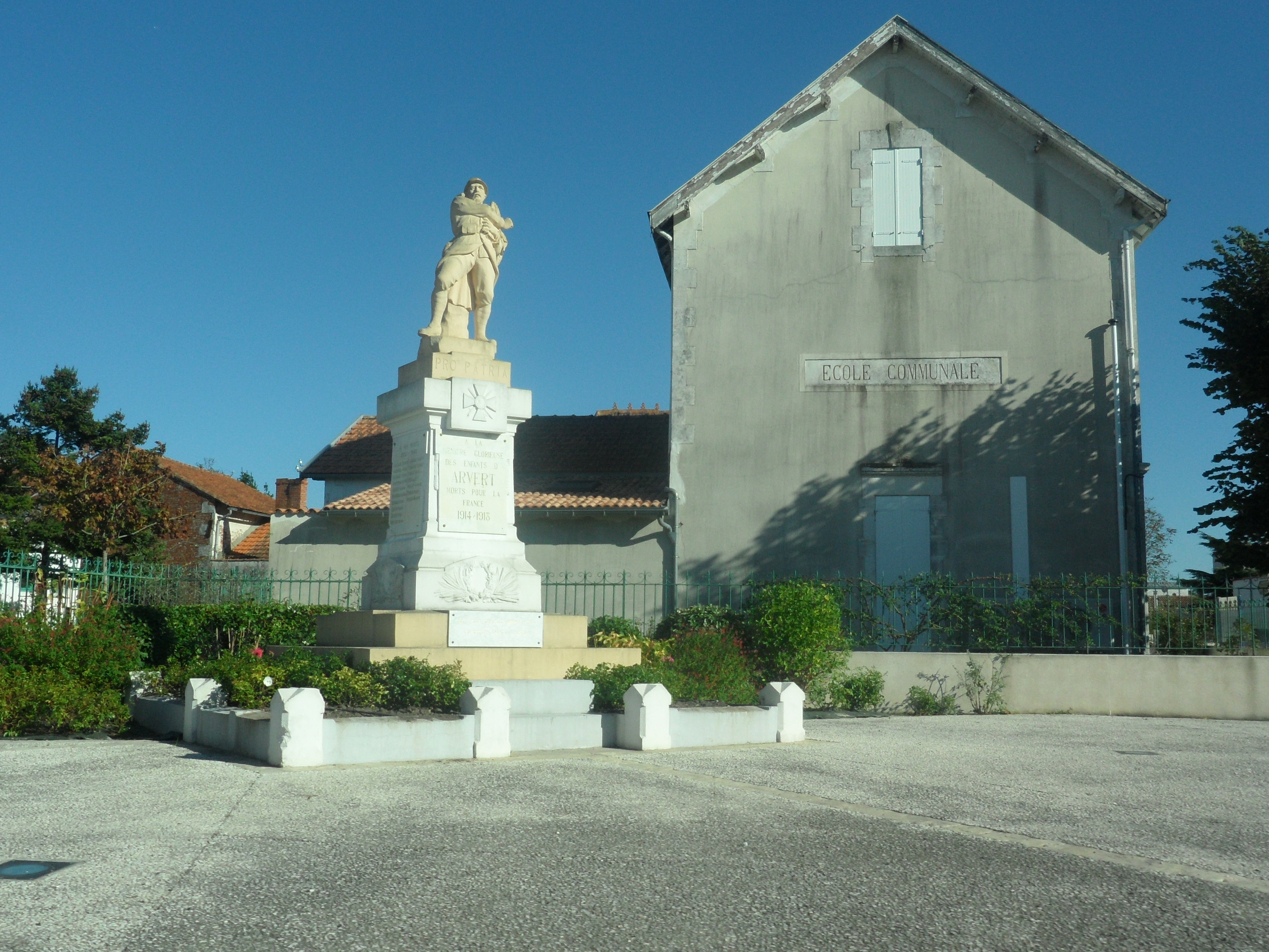 Monument aux morts d'Arvert